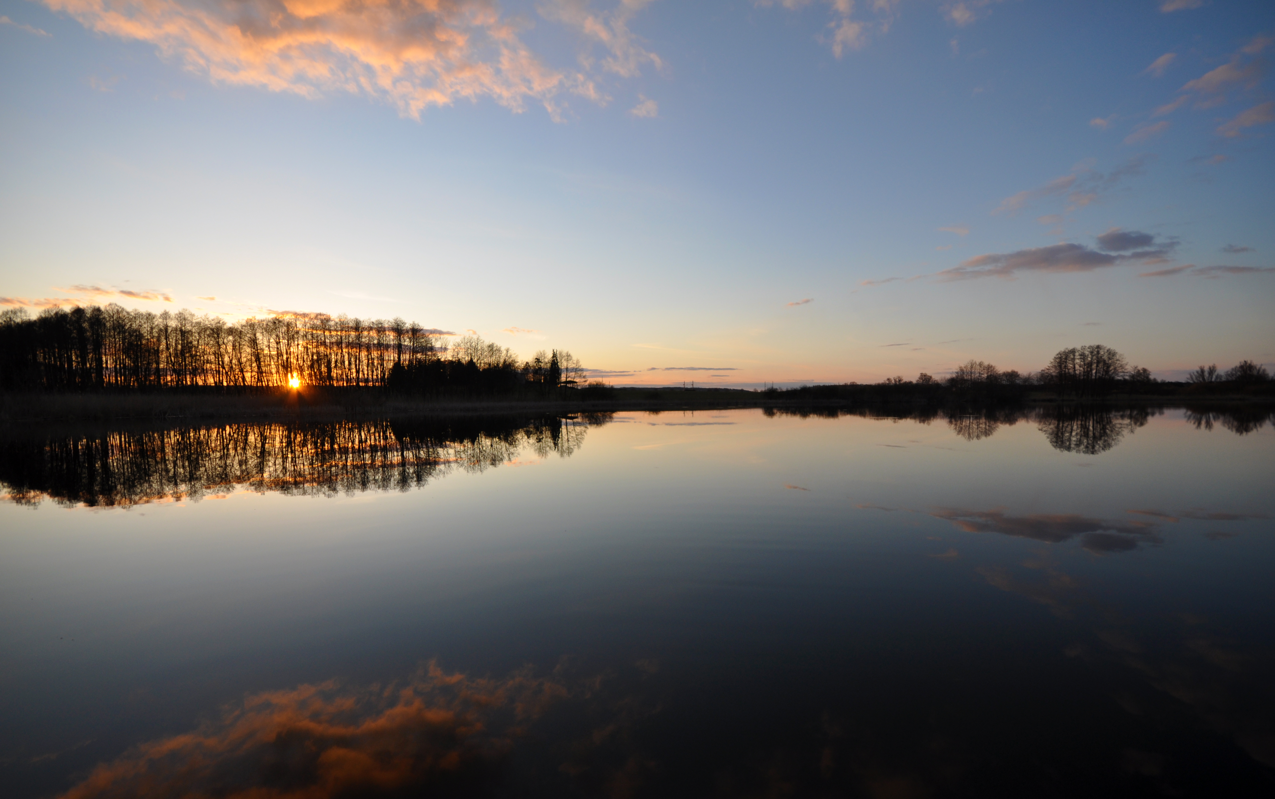 Kleiner Mudrowsee (aka Priestersee) near Angermünde 1